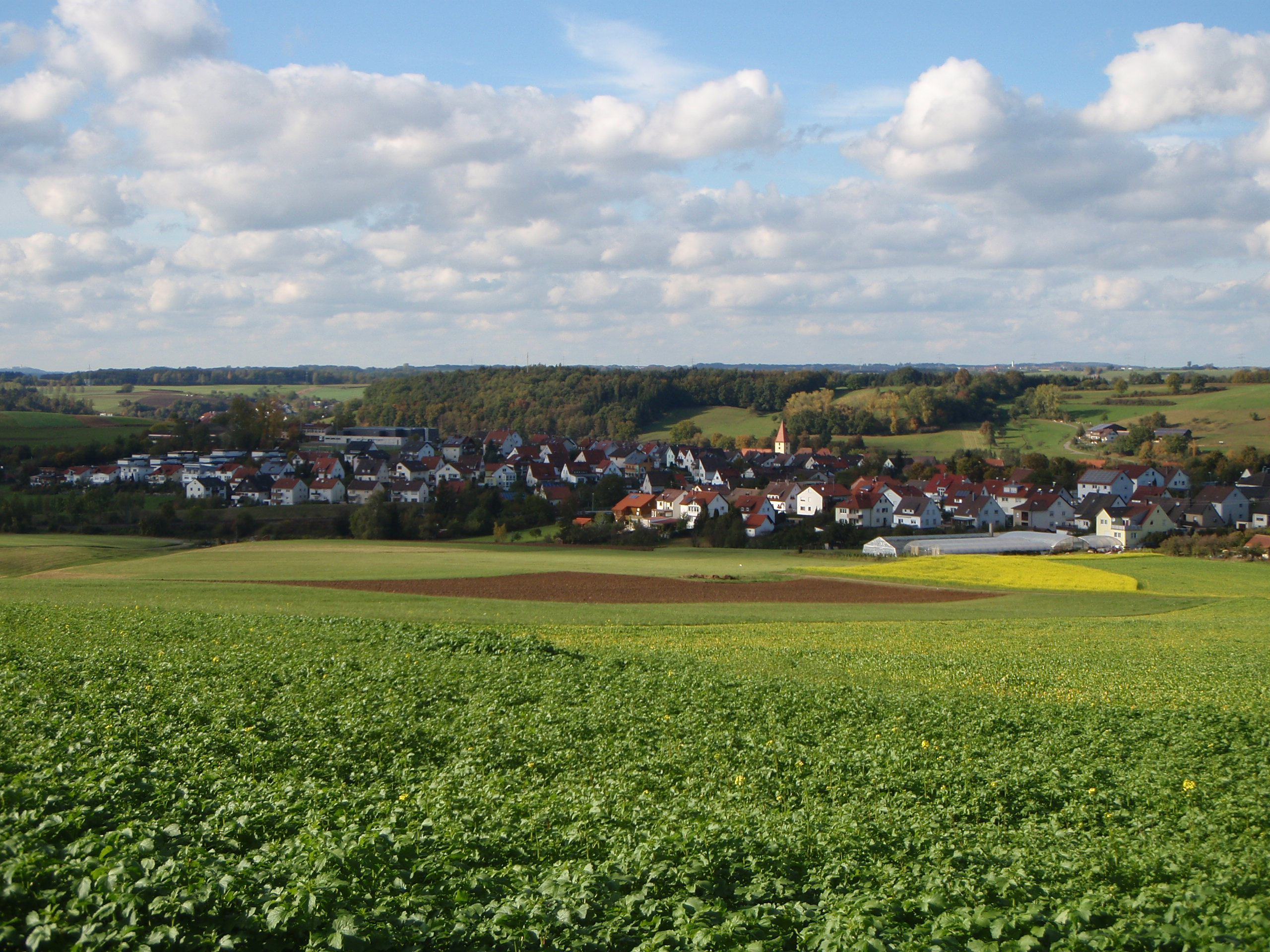 Blick vom Eichelberg auf Hofen